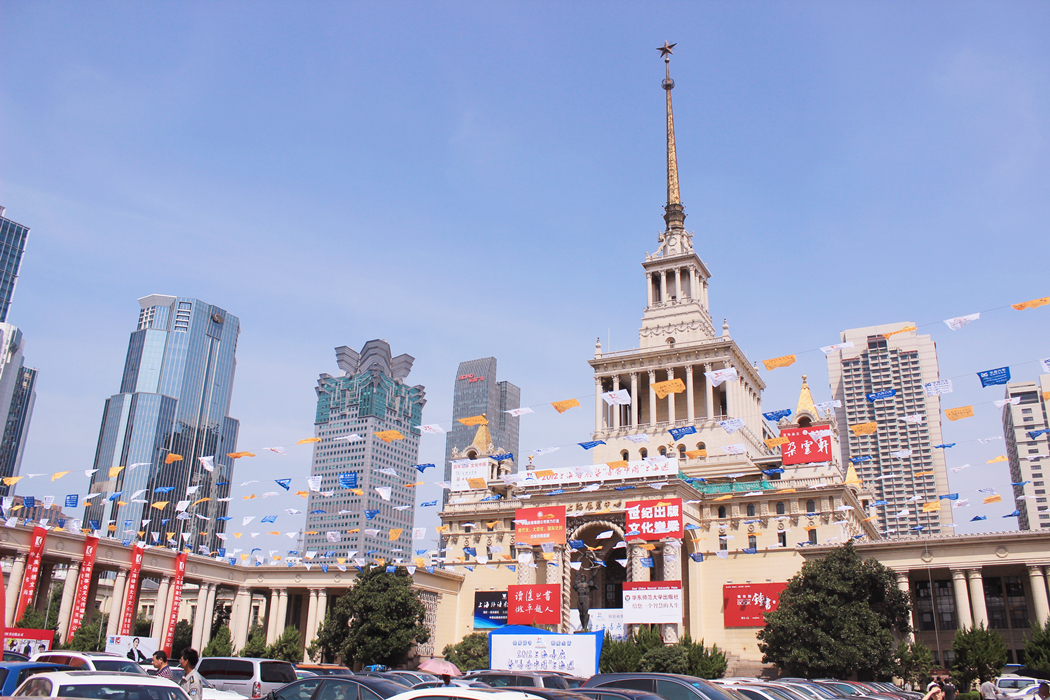 摄于2012年上海书展